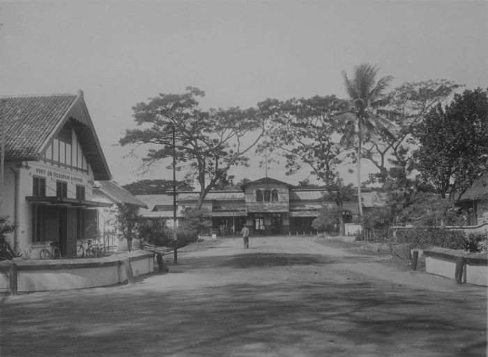 foto. Post- en telegraafkantoor en spoorwegstation